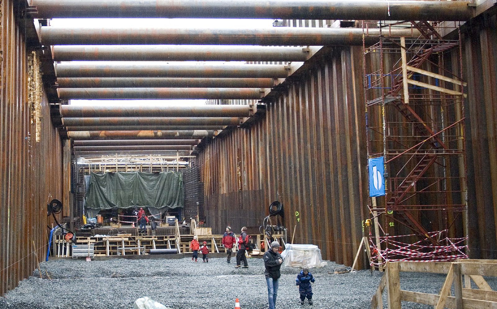 Nordre Avlastningsvei Trondheim. open day, deepest point in Skansenløpet